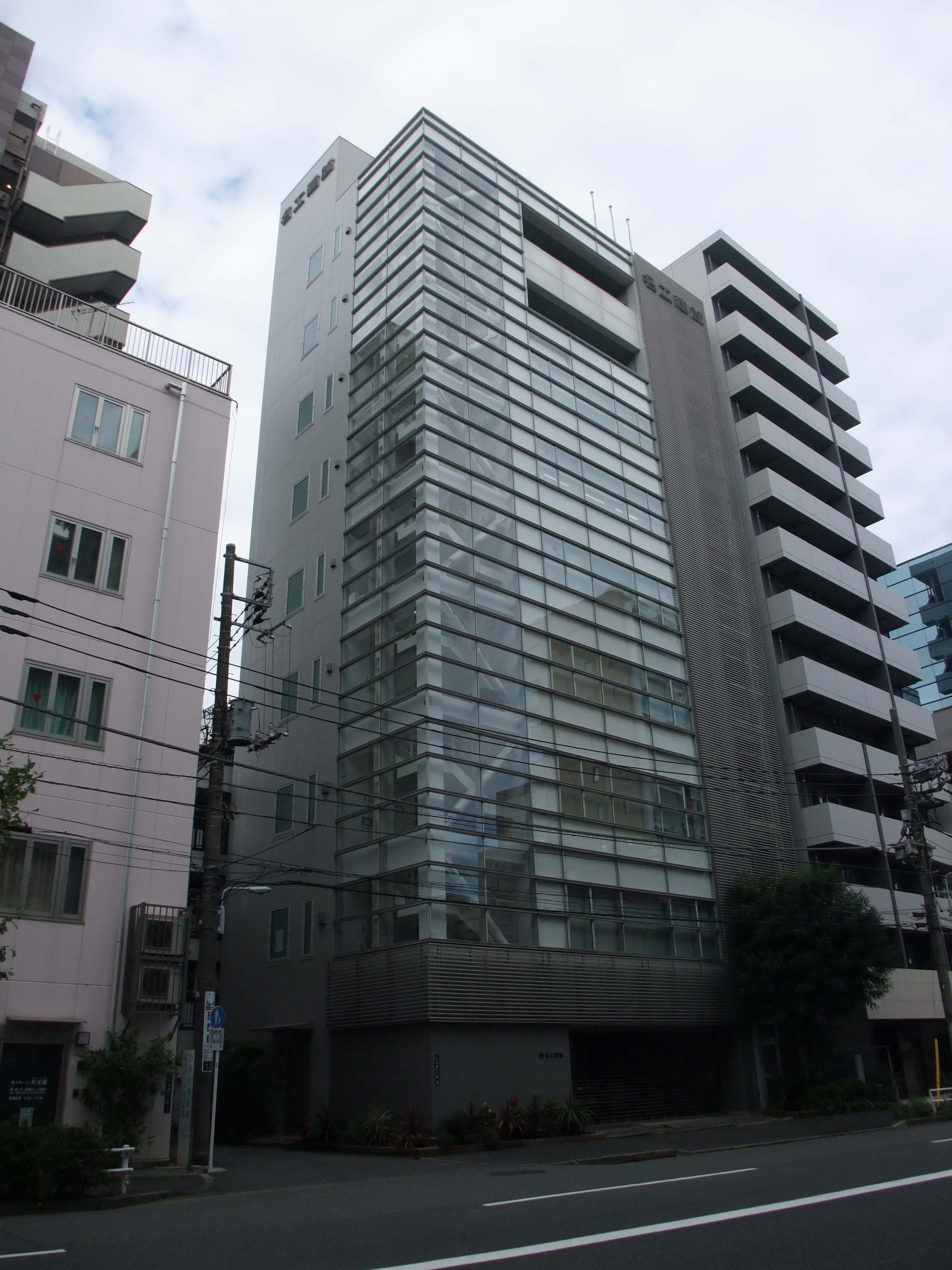 東京都台東区の名工建設東京ビル